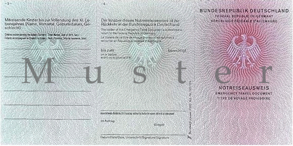 Notreiseausweis, Vorderseite ([1])